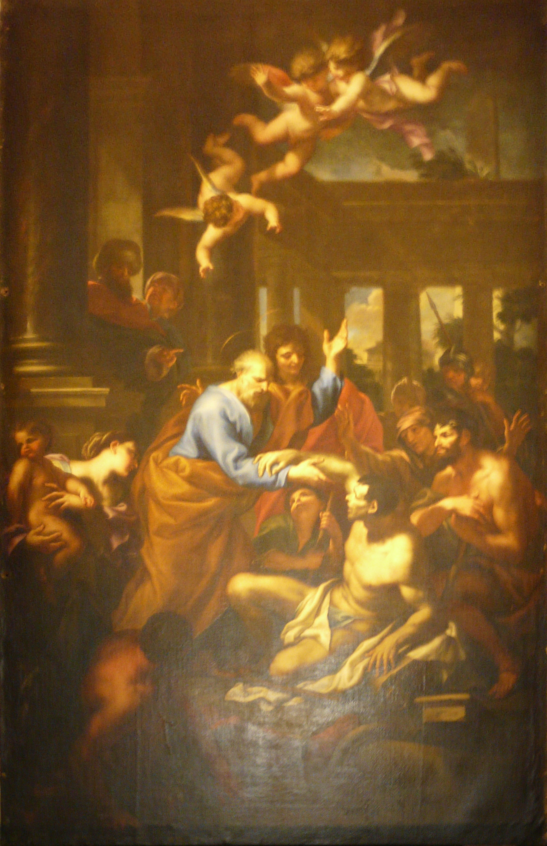 San Pietro risana lo zoppo. Dipinto di Domenico Piola, Basilica di Santa Maria Assunta di Carignano, Genova, Liguria, Italia